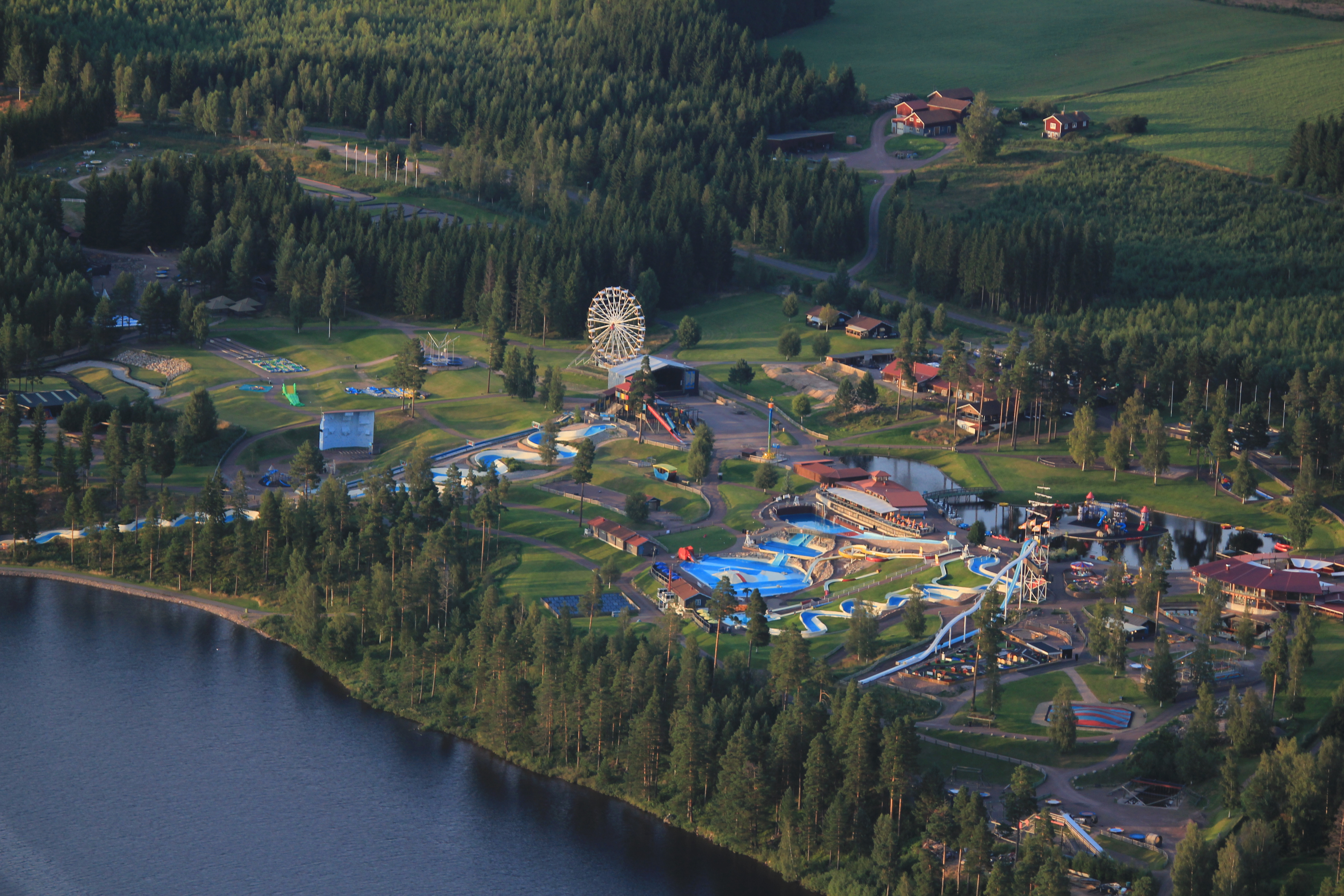 Flygfoto över Leksands sommarland, Leksands kommun, Dalarnas län, Sverige This aerial photograph has been approved for publishing by the Swedish Armed Forces with the ID: FMTM 10 830:11043 This tag does not indicate the copyright status of the attached work. A normal copyright tag is still required. See Commons:Licensing for more information. English | svenska | +/−